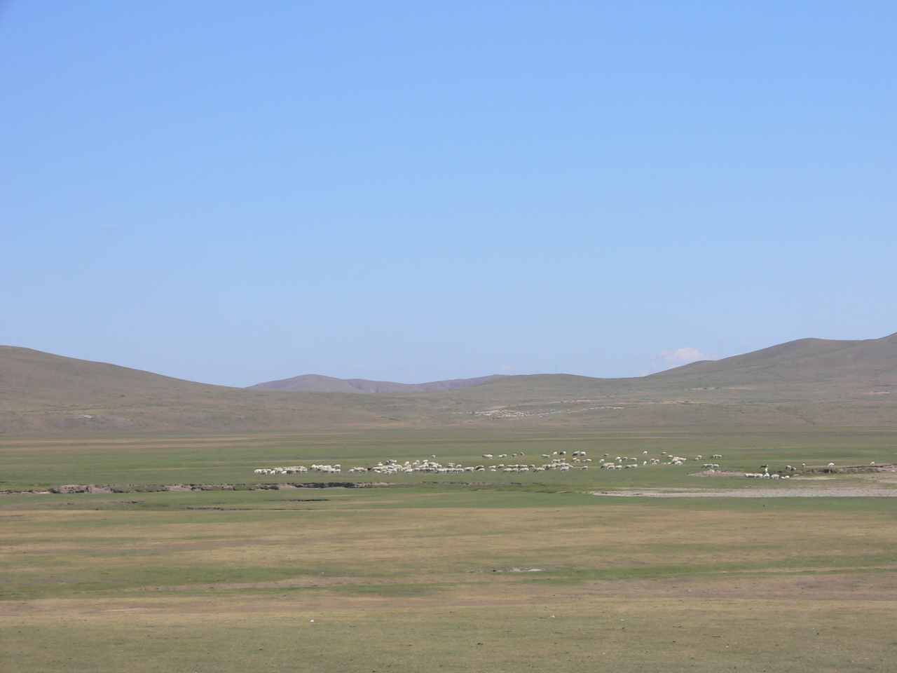 巴彦查干